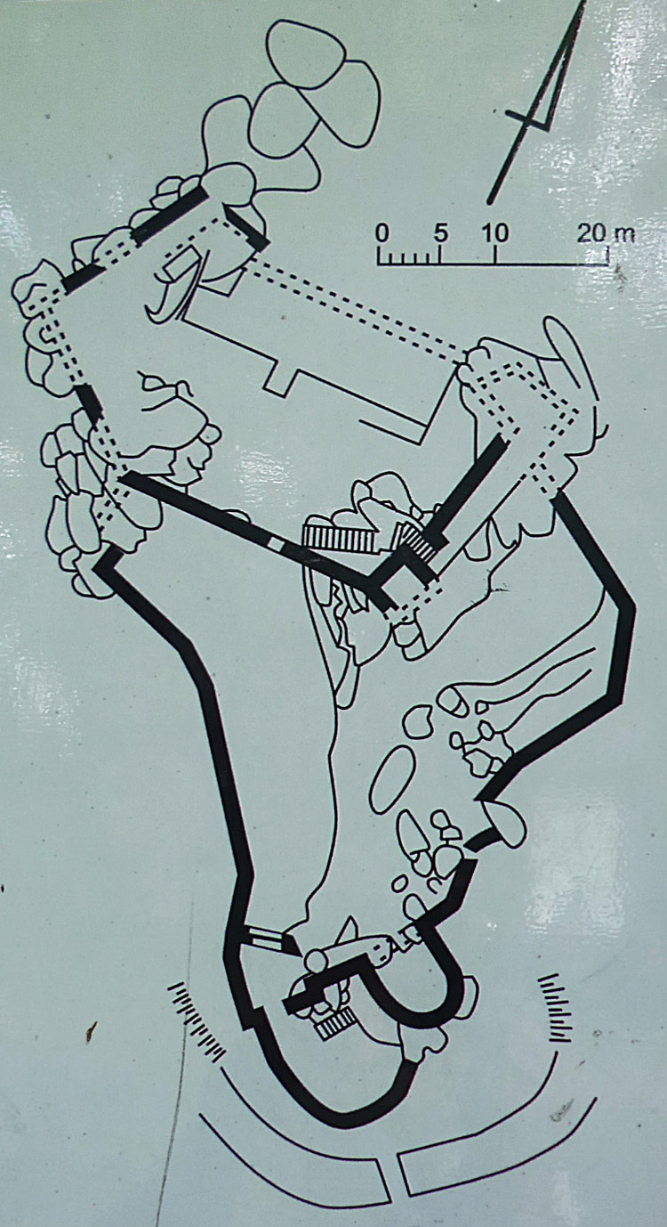 Burgruine Bolzenschloss (Bolczów) bei Jannowitz (Janowice Wielkie) in Niederschlesien, Burganlage